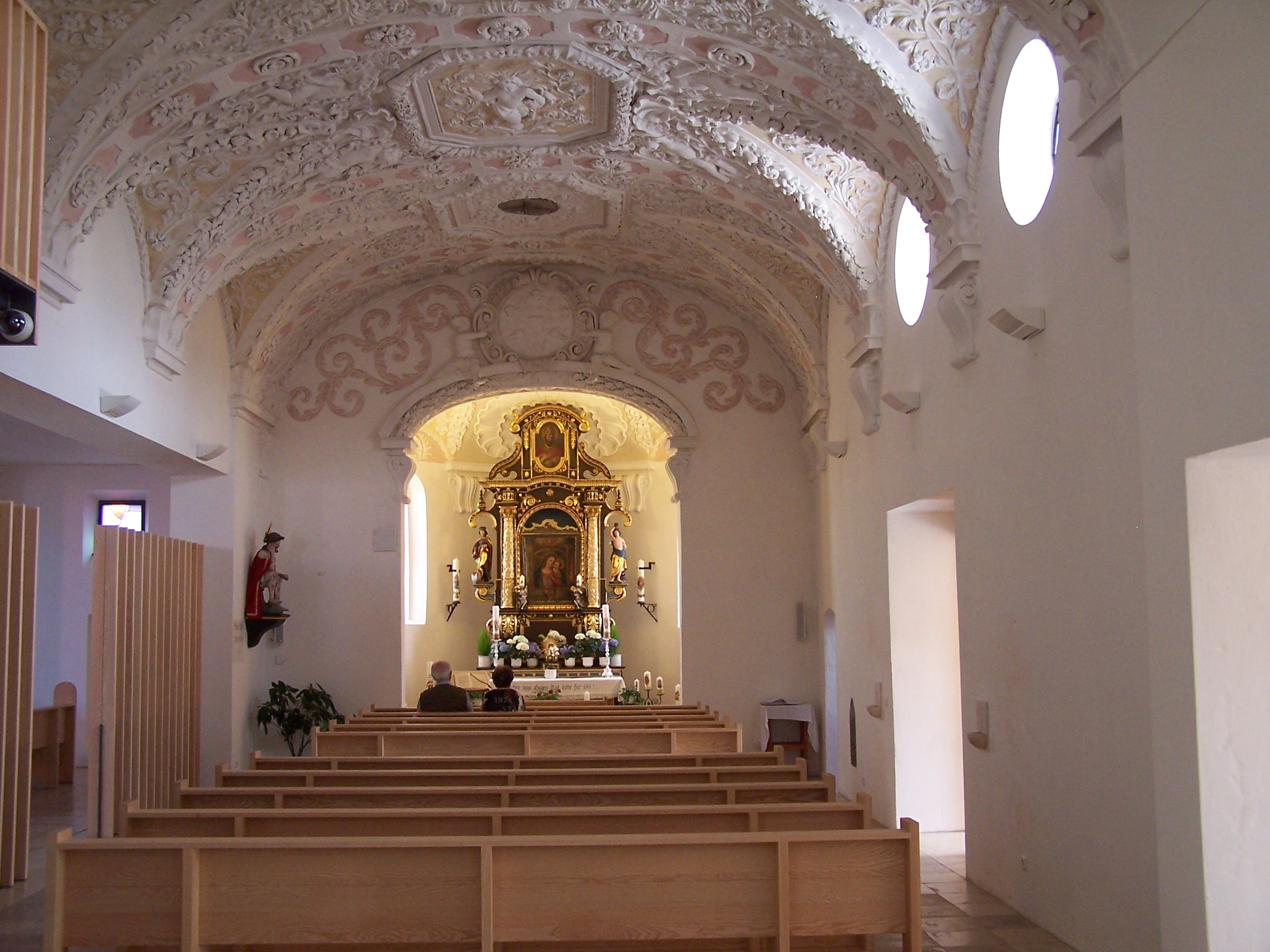 Wörth an der Isar. Landshuter Straße 55. Katholische Pfarrkirche St. Laurentius. Ursprünglich romanische Anlage, Westchor und Teile der Langhausmauern in den barocken Erweiterungsbau Ende 17. Jahrhundert übernommen. Die alte Kirche mit reicher Stuckdecke steht quer zum Erweiterungsbau. Der Chor ist geostet.